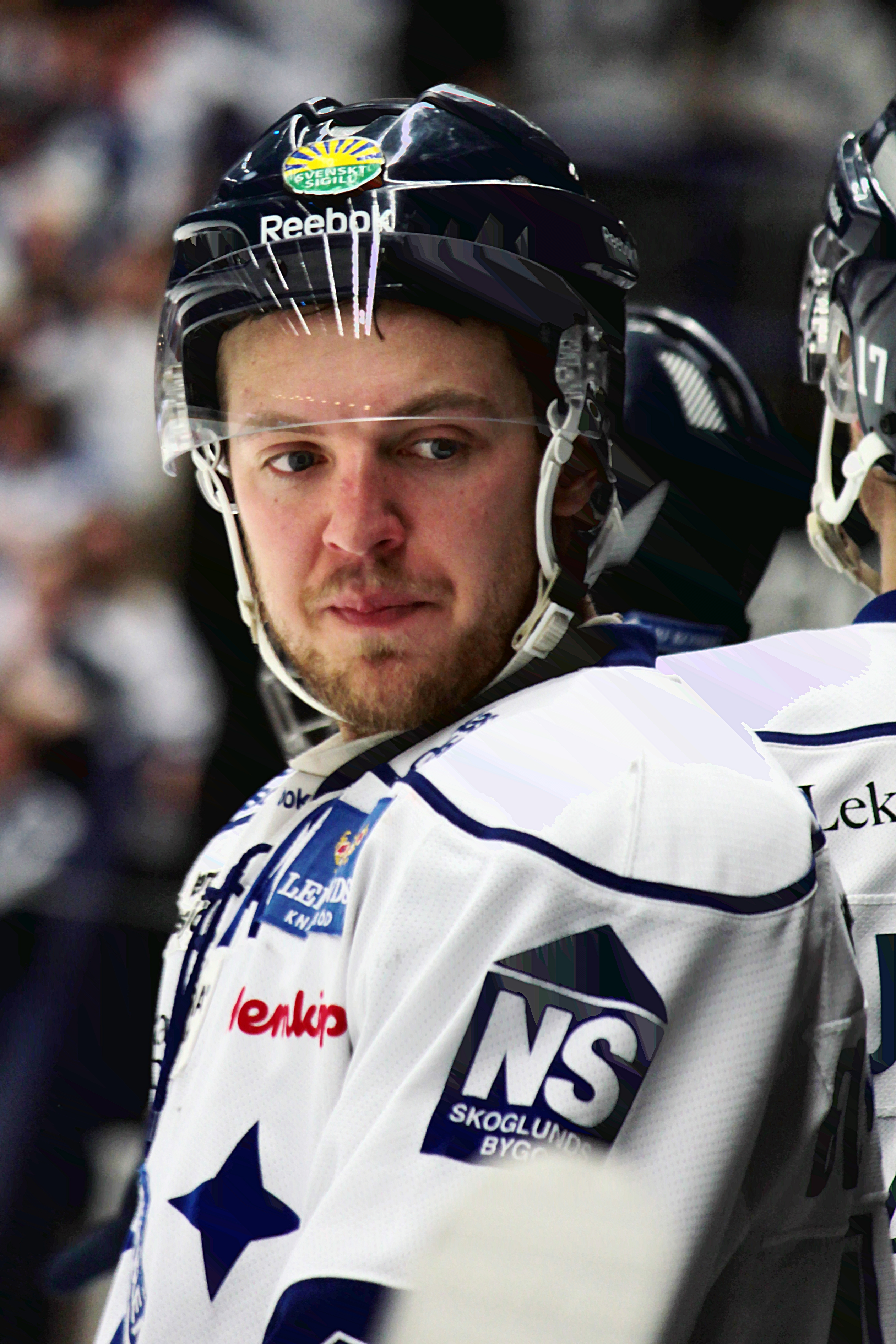 Jacob Blomqvist i kvalmatchen mellan Leksands IF och Djurgårdens IF i Leksand 2012-03-31.